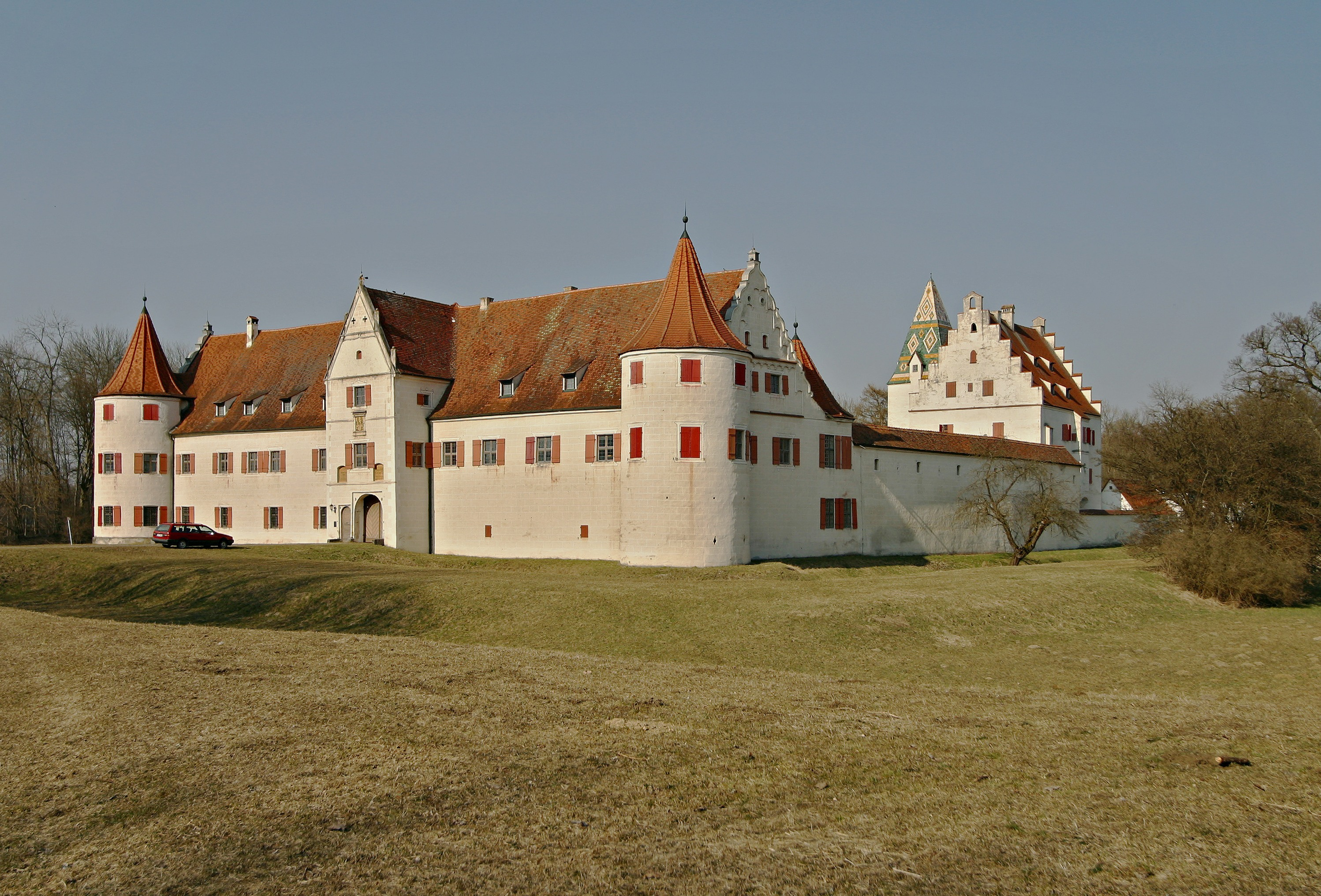 Jagdschloss Grünau an der Donau, Ansicht von außen